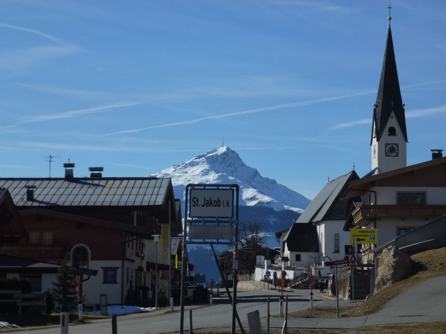 St. Jakob i. H., Blick zum Kitzbüheler Horn